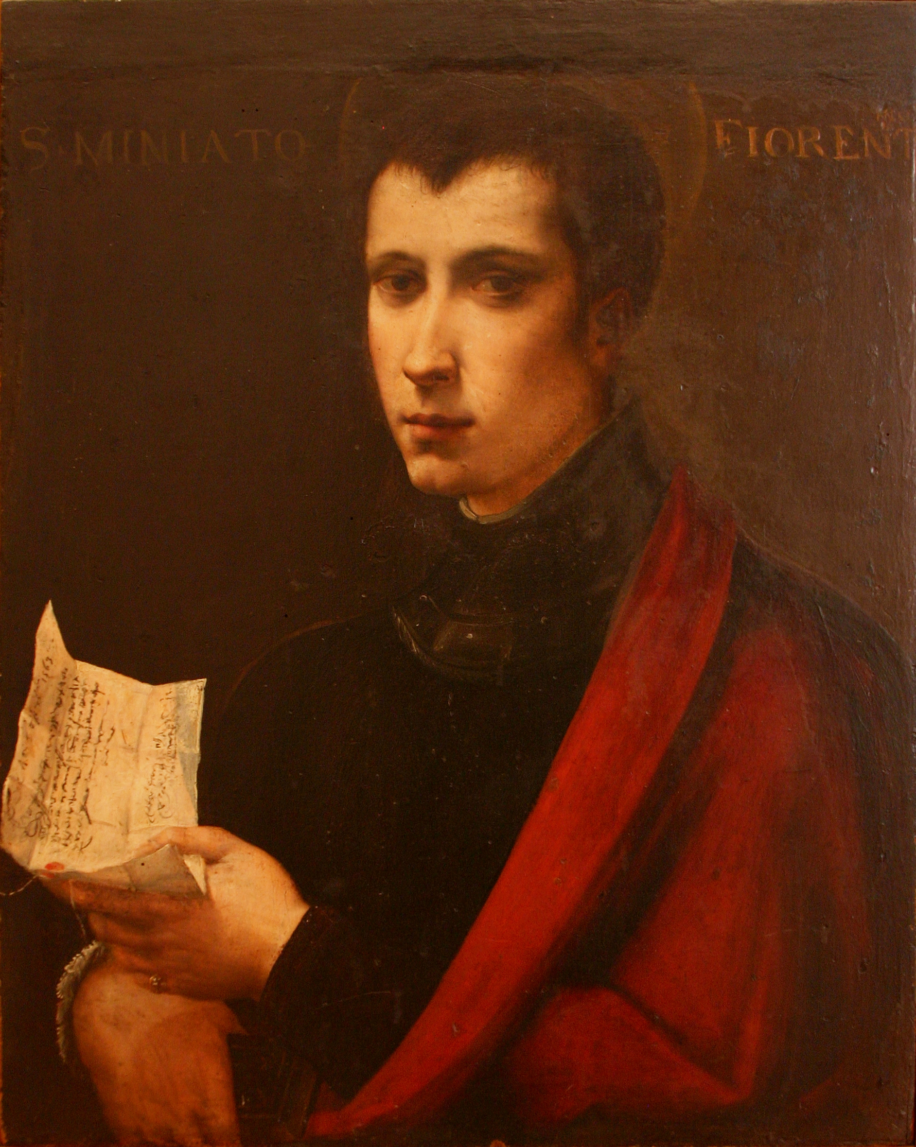 Palazzo Abatellis